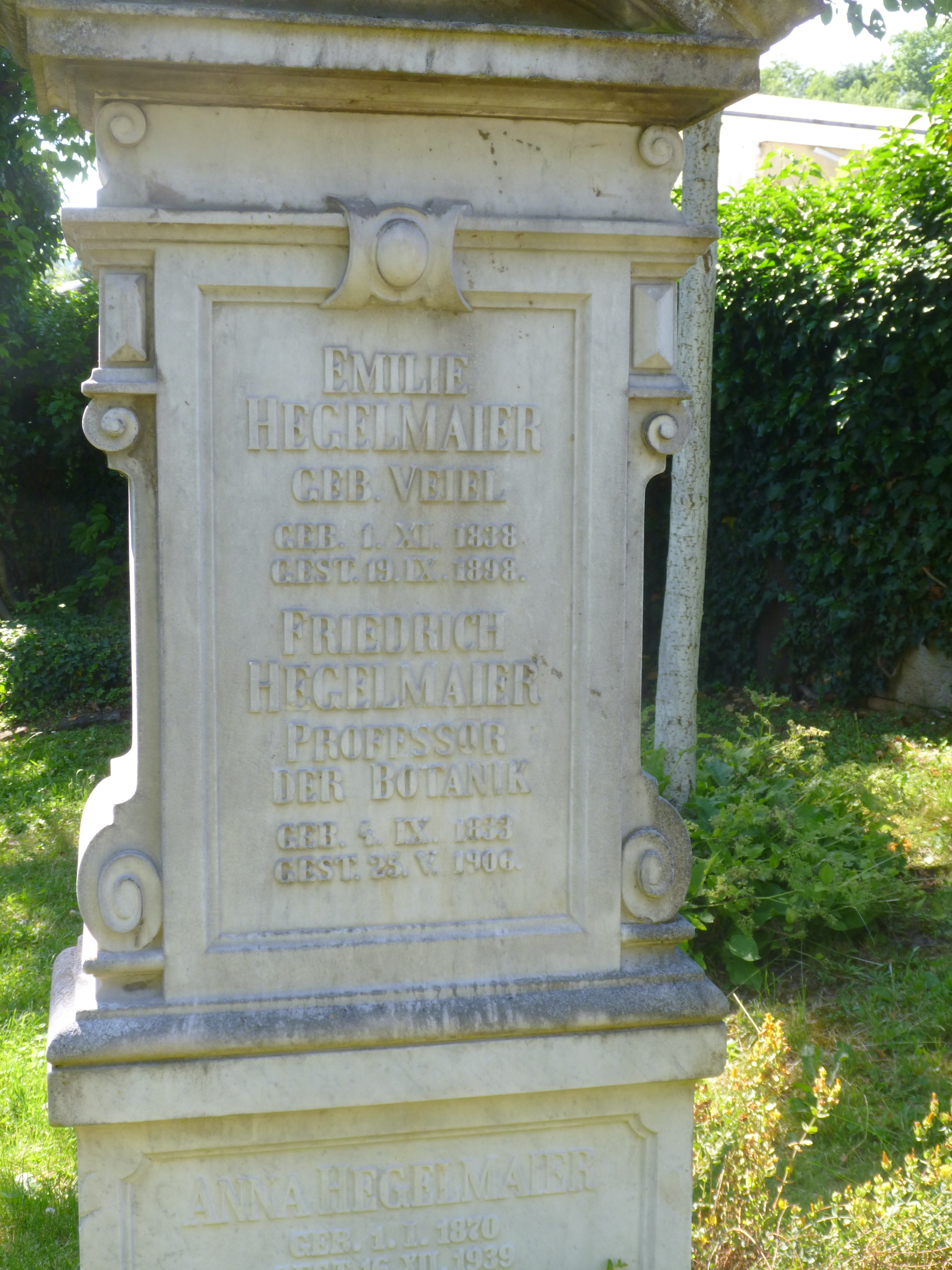 Christoph Friedrich Hegelmaier Stadtfriedhof Tübingen